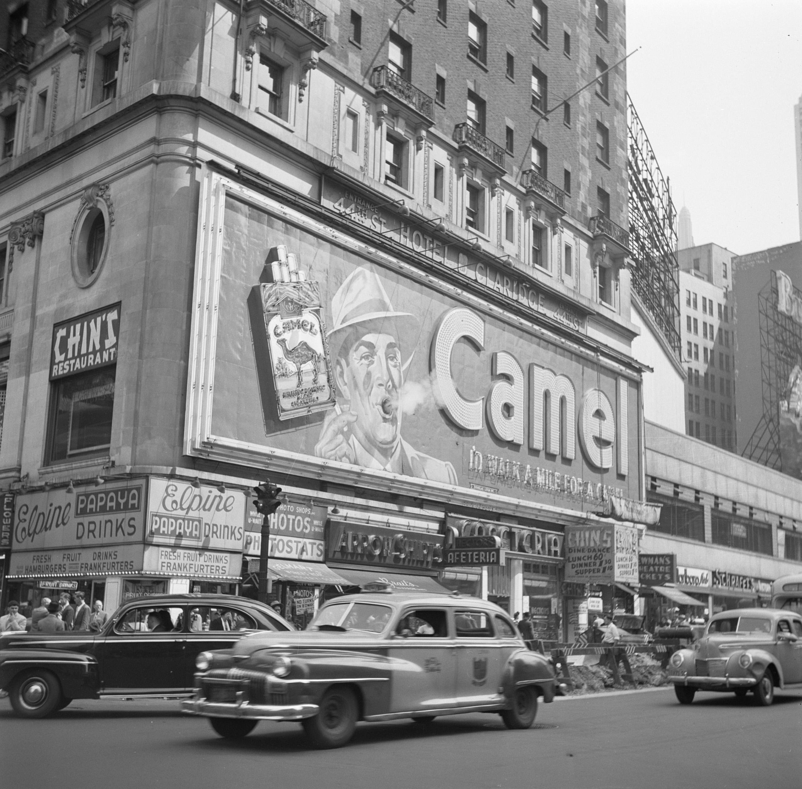 Collectie / Archief : Fotocollectie Van de Poll Reportage / Serie : Straatbeelden van New York Beschrijving : Reclamebord met echte rook voor sigarettenmerk Camel op Times Square Datum : juni 1948 Locatie : New York (stad), VS Trefwoorden : reclameborden, straatbeelden Fotograaf : Poll, Willem van de Auteursrechthebbende : Nationaal Archief Materiaalsoort : Glasnegatief Nummer archiefinventaris : bekijk toegang 2.24.14.02 Bestanddeelnummer : 191-0803